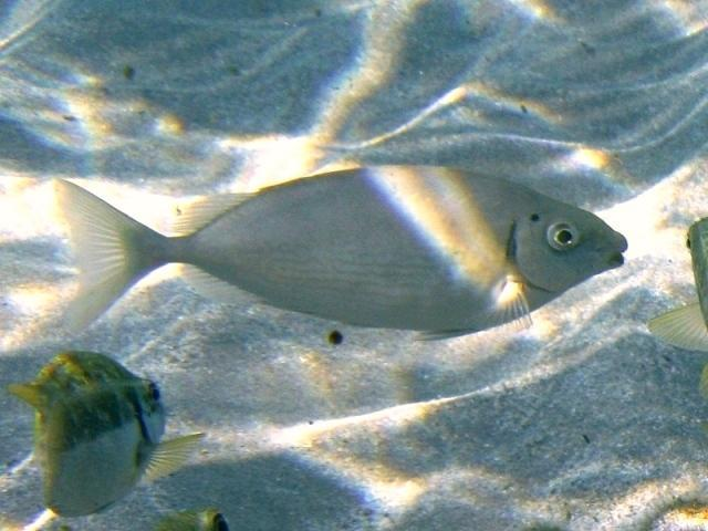 Siganus rivulatus en Creta, Grecia